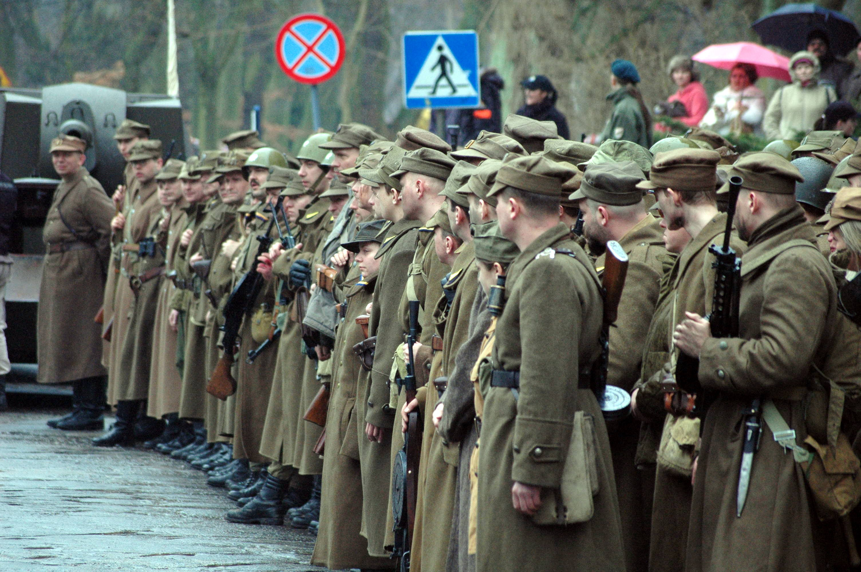 Bój o Kołobrzeg